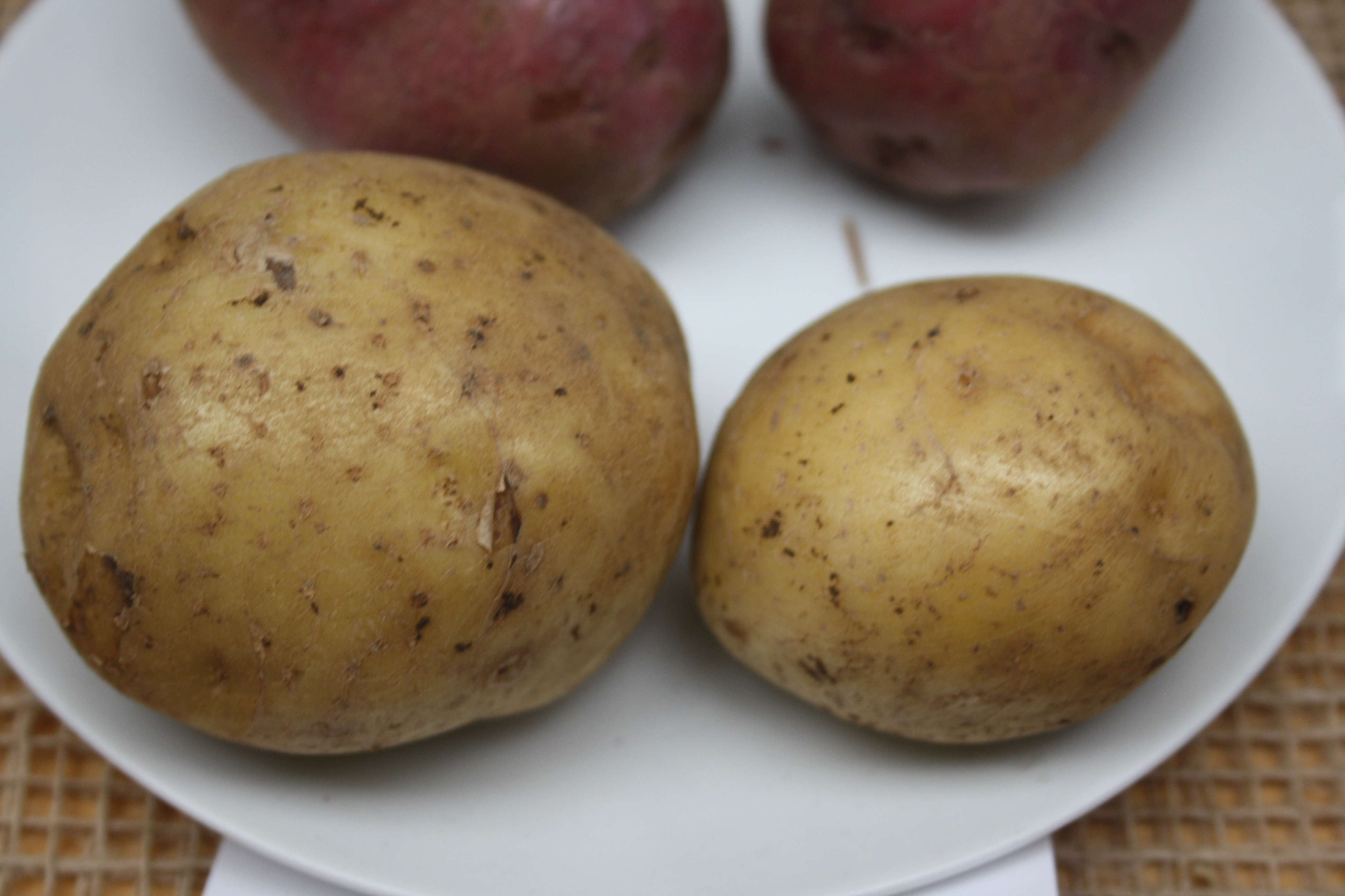 Bild aufgenommen auf dem Apfeltag auf Gut Wulksfelde - Sortenname im Dateinamen laut Beschriftung vor Ort